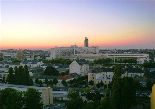 Vue sur Nantes CHU/Tour Bretagne